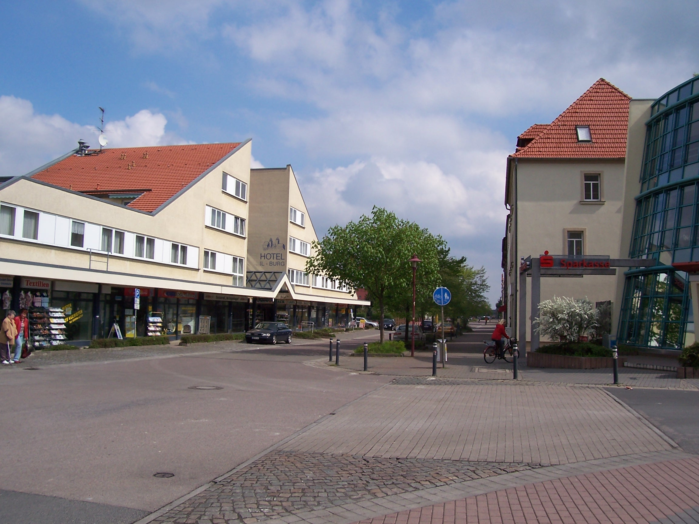 Puschkinstraße in Eilenburg, Zentrum des Stadtteils Ost